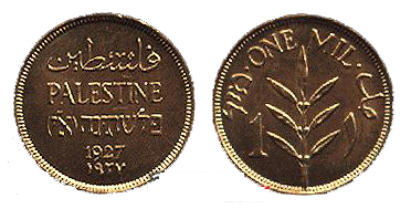 0,001 palestinian pouns .gif